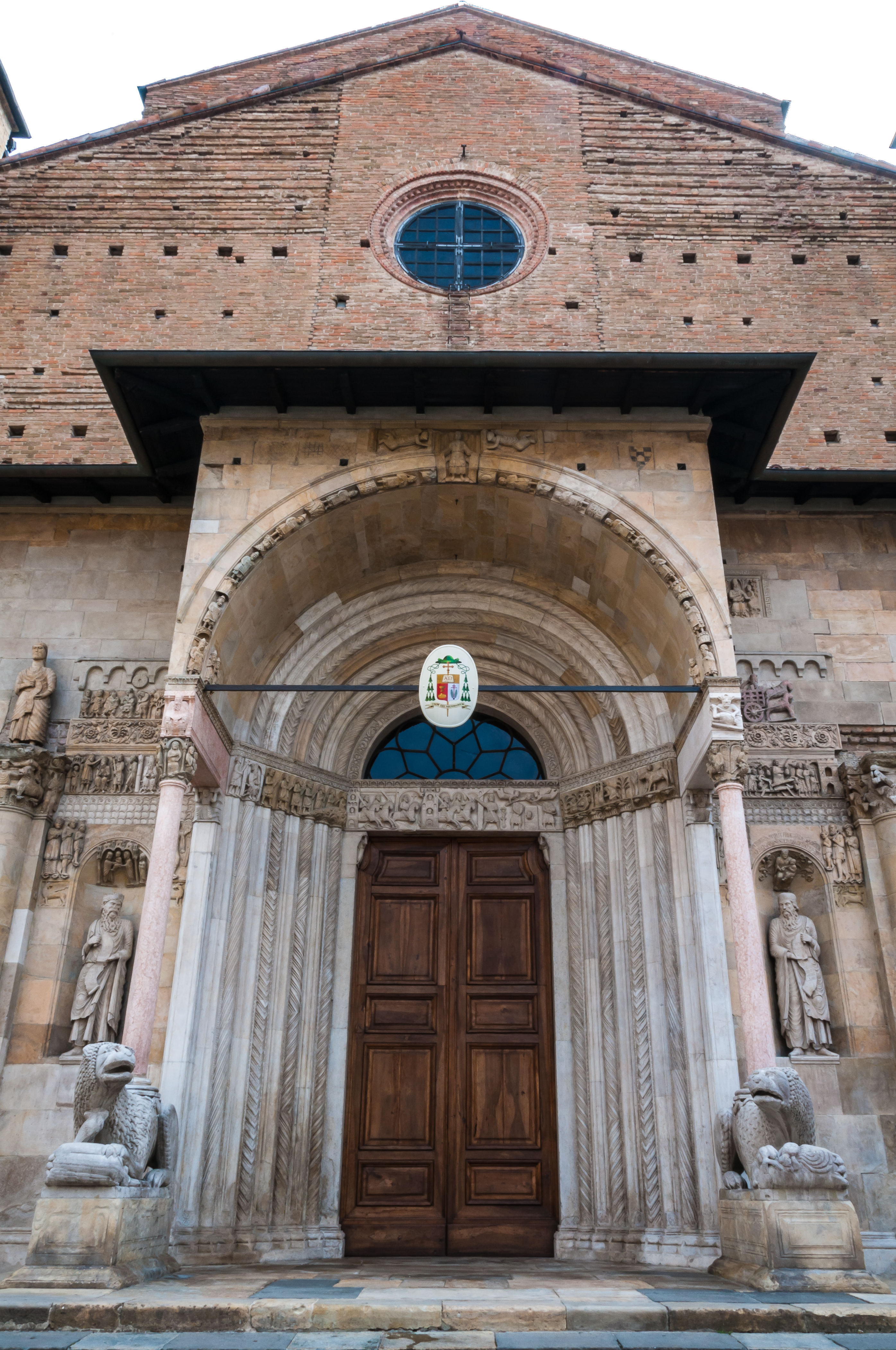 Ingresso del Duomo di Fidenza